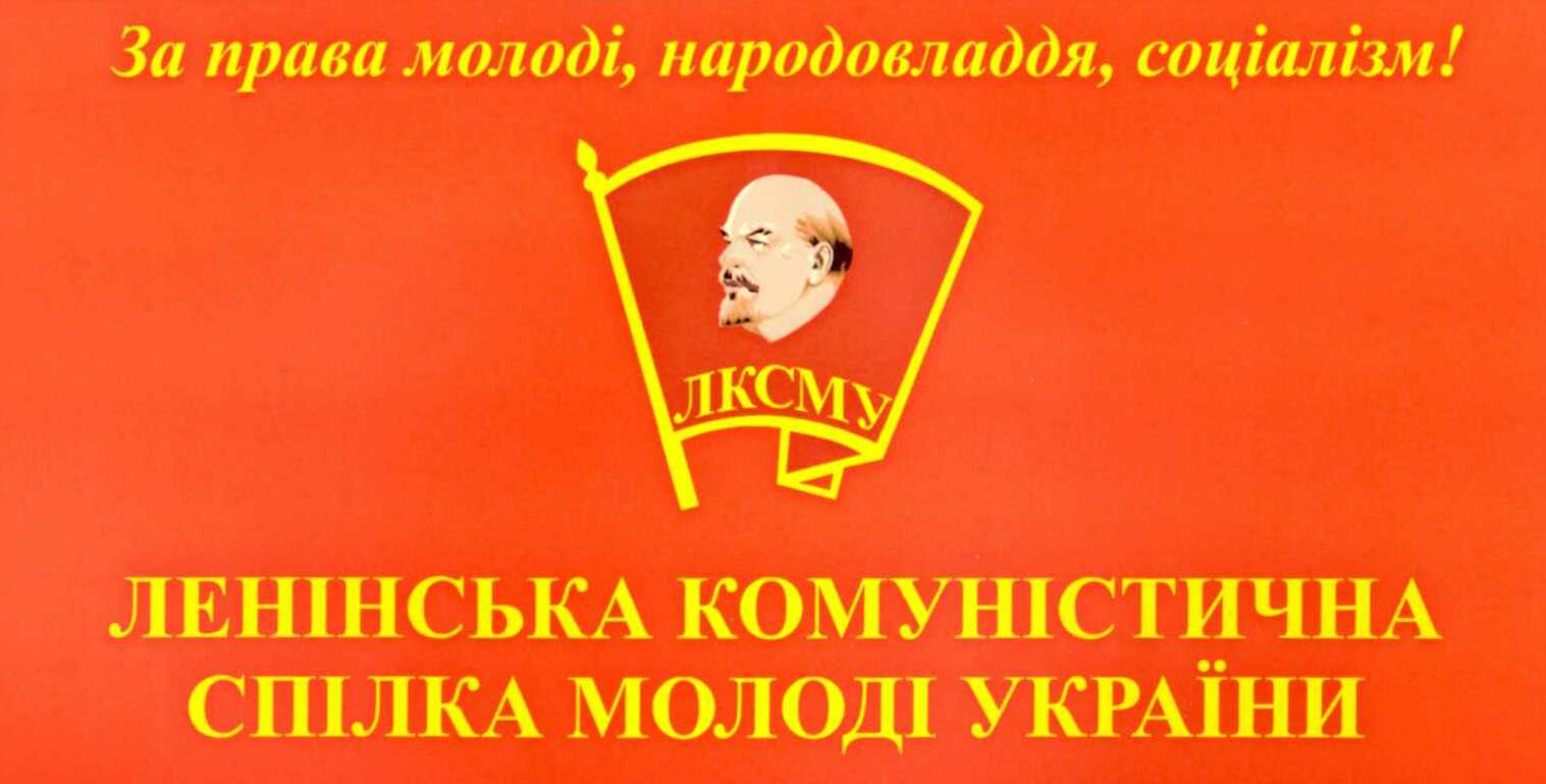 Прапор Ленінської комуністичної спілка молоді України. Опис: "Прапор ЛКСМУ являє собою прямокутне червоне полотнище ширина якого співвідноситься із довжиною як 1:2, в центрі якого зображення емблеми ЛКСМУ, над емблемою напис "За права молоді, народовладдя, соціалізм!", а під емблемою назва Спілки "Ленінська Комуністична Спілка Молоді України", обидва написи виконані золотими літерами. Зворотна сторона прапора без зображень і написів. (